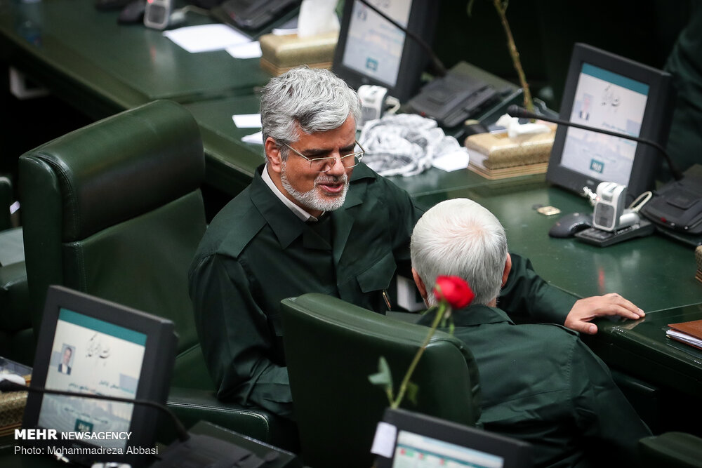 حضور نمایندگان مجلس شورای اسلامی ایران با یونیفرم سپاه پاسداران انقلاب اسلامی در جلسهٔ علنی ۲۰ فروردین ۱۳۹۸، به مناسبت روز پاسدار و در محکومیت اقدام دولت ایالات متحدهٔ آمریکا به قرار دادن سپاه پاسداران در فهرست گروه‌های تروریستی